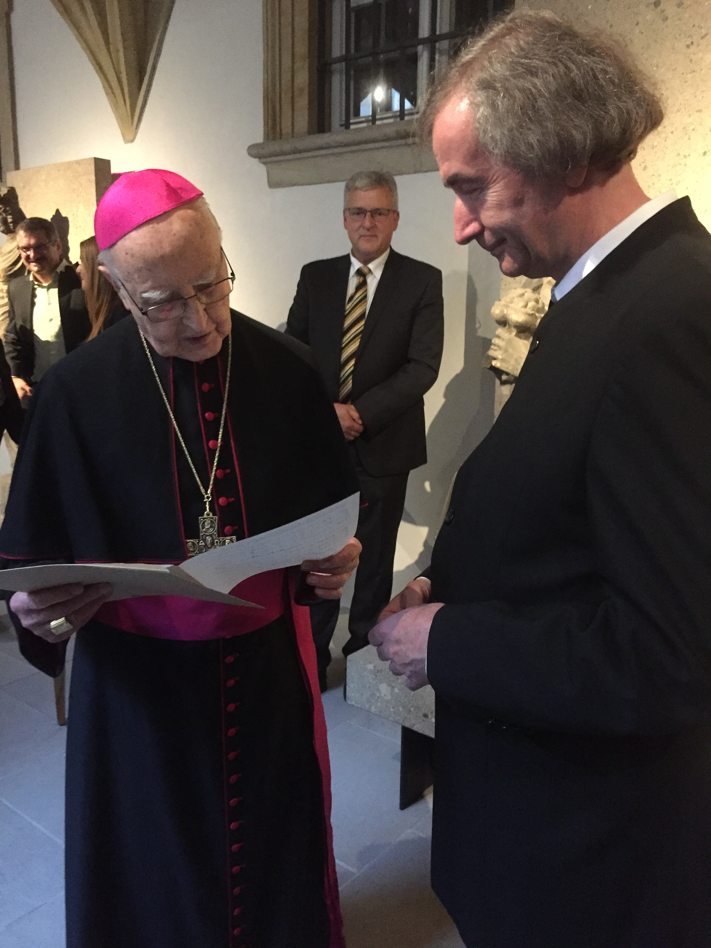 Erzbischof Karl Braun und Ludger Stühlmeyer im Bamberger Dom